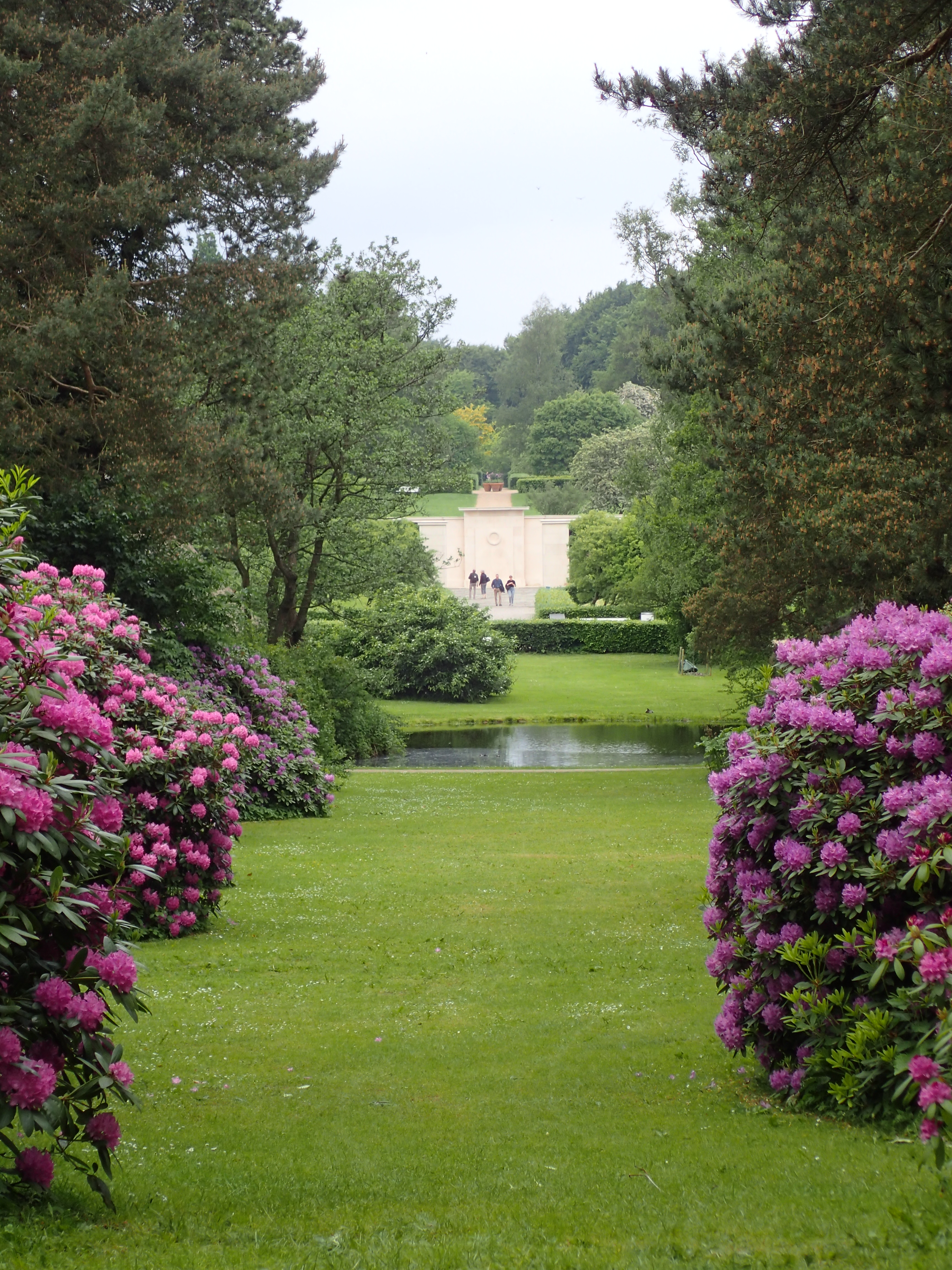 Donbækhaven. Udkik langs sigtelinie mod Monumentet mellem nogle blomstrende rhododendron.